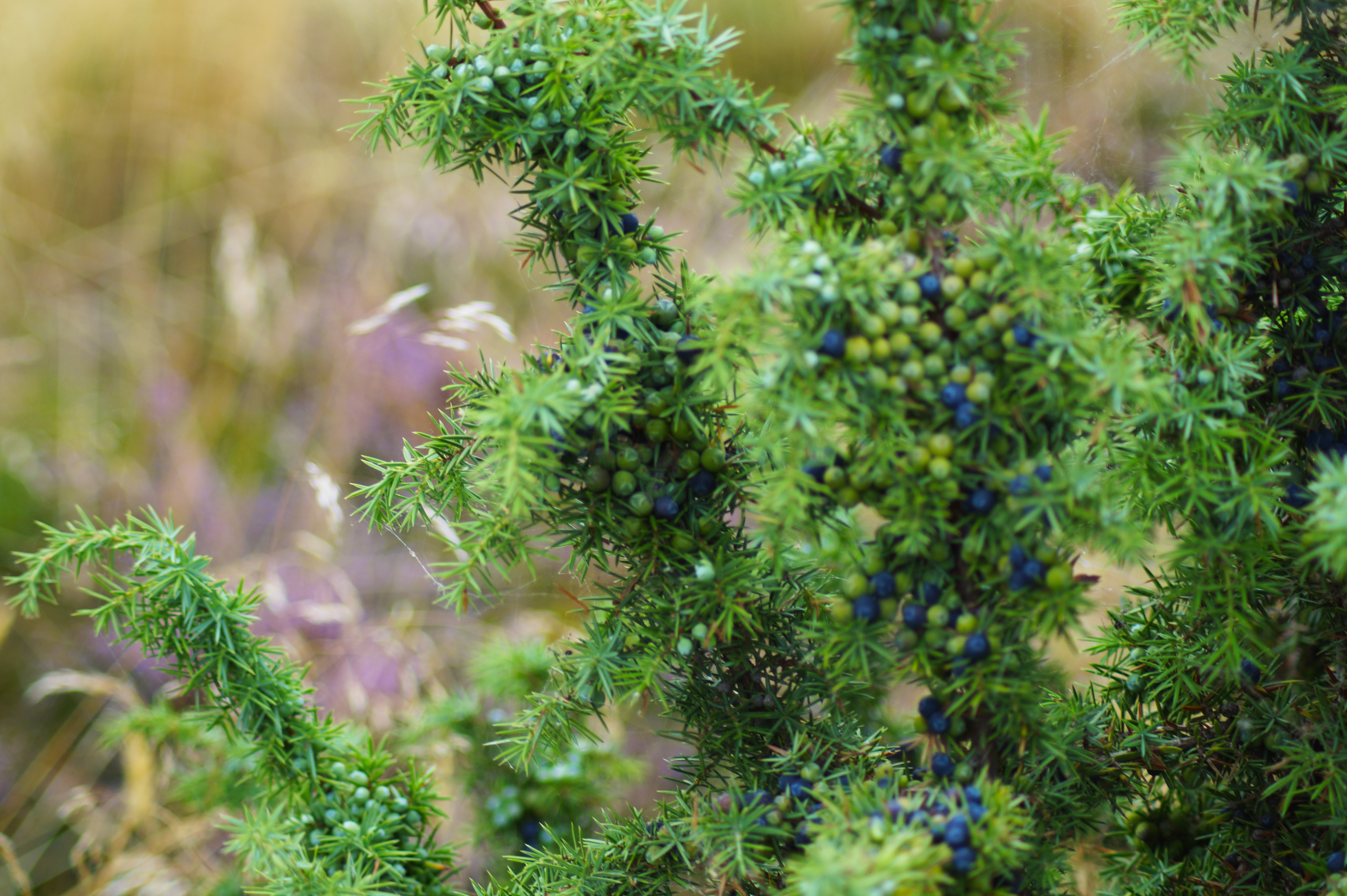 Promenade en montagne... - Alsace, France.